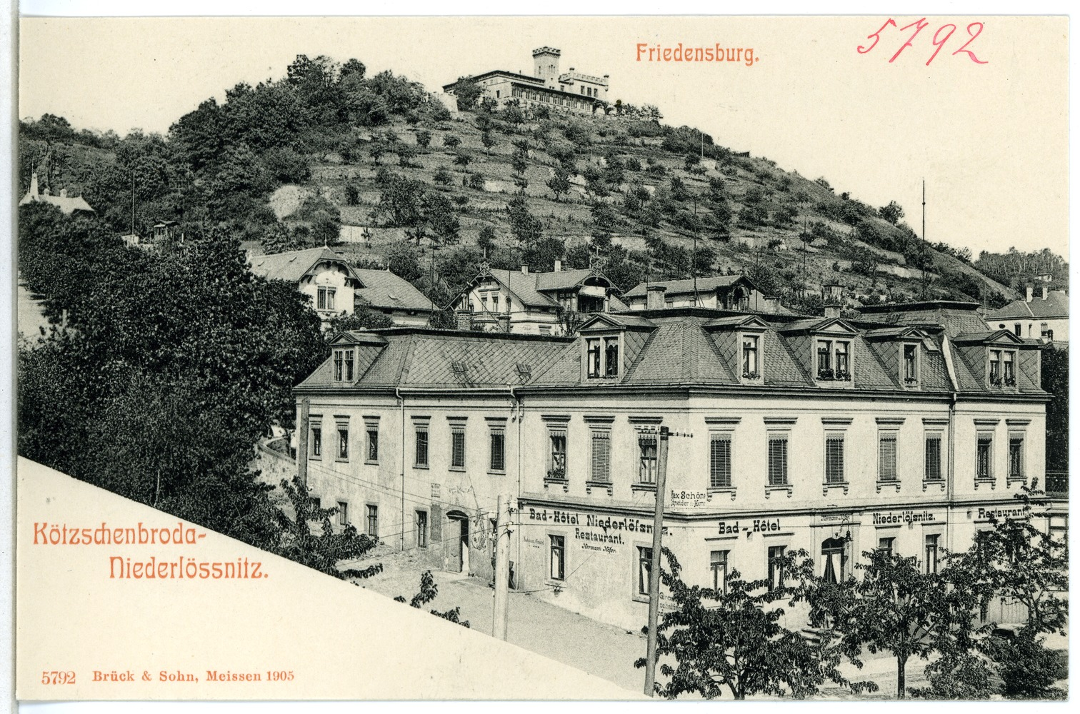 Kötzschenbroda; Blick über das Badhotel zur Friedensburg This postcard is from publisher Brück & Sohn in Meißen ( postcard has a unique number 05792 and is available in a higher resolution at the publisher. This images was uploaded in a cooperation project between Wikipedians and the publisher.